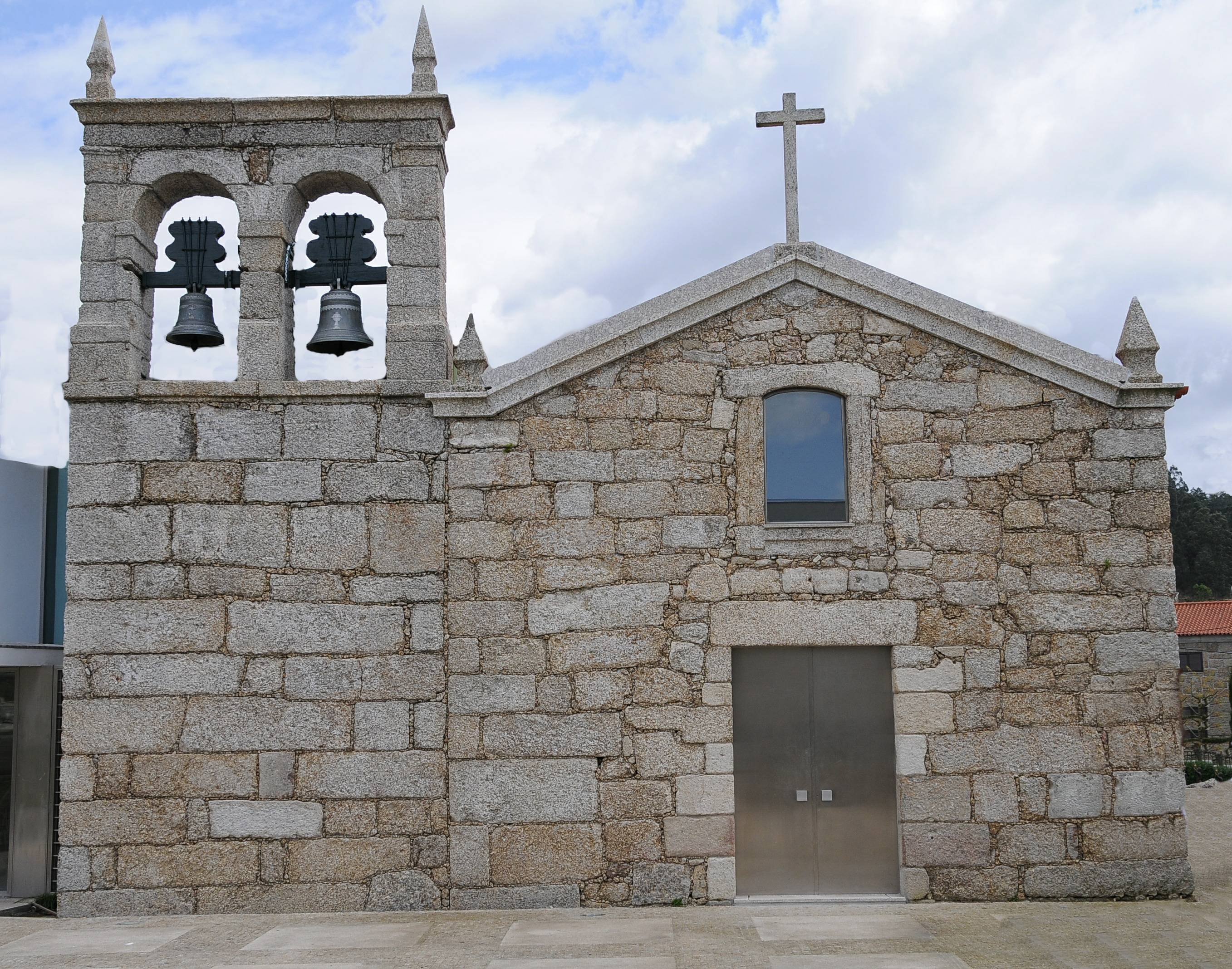 fradelos Church in Braga, Portugal